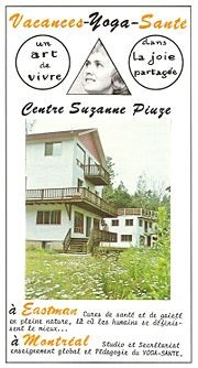 Image du prospectus publicitaire du Centre de Yoga Suzanne Piuze en Estrie.